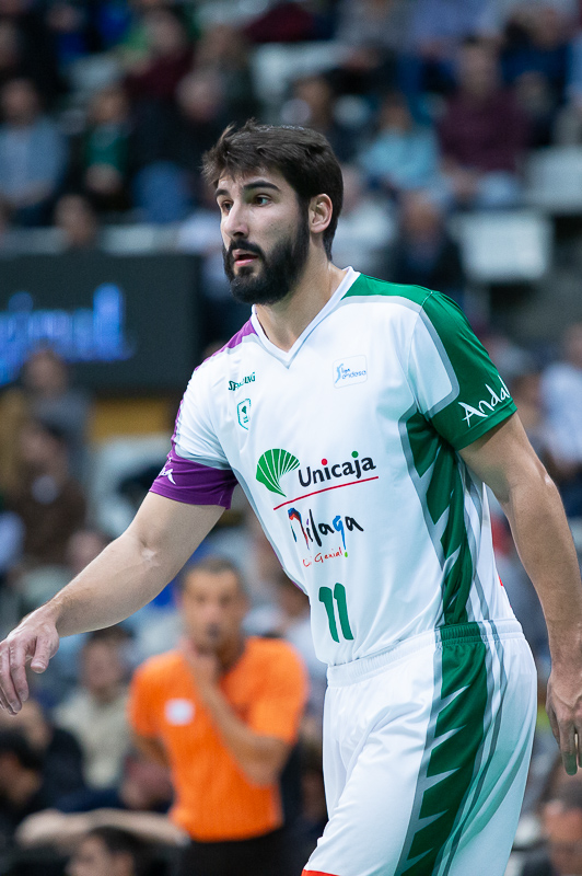 Daniel Díez de la Faya en un partido de la liga ACB en el Palau Olímpic de Badalona entre el Divina Seguros Joventut y el Unicaja.